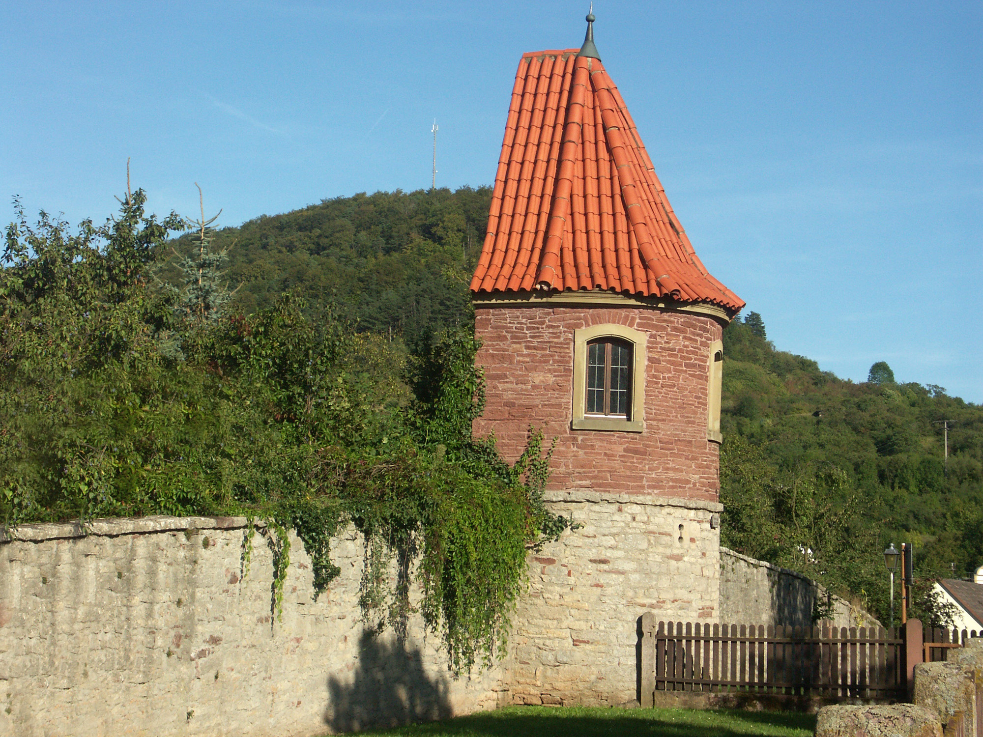 Stadtmauer in Euerdorf mit rekonstruiertem Wehrturm